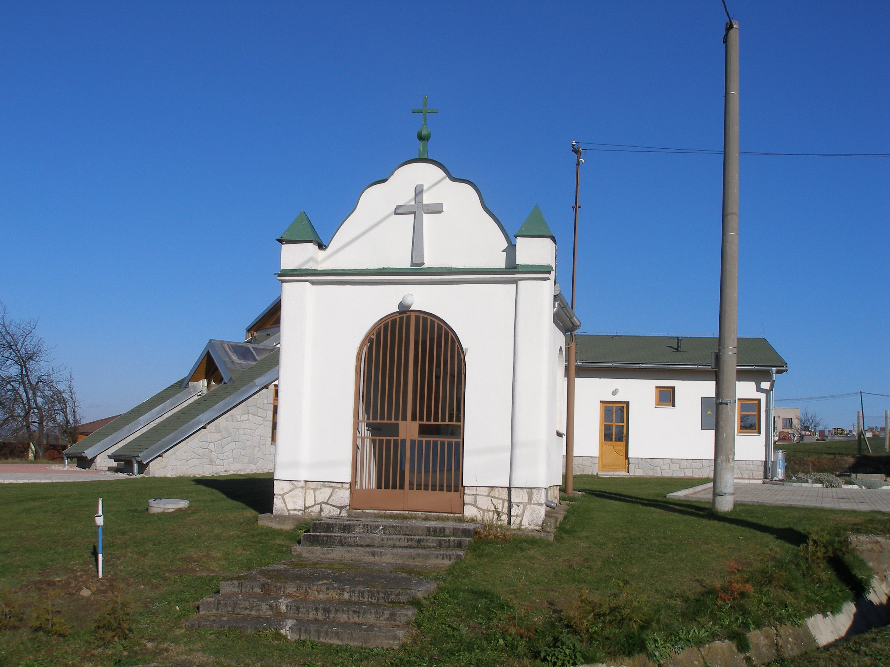 Obec Záborské v okrese Prešov